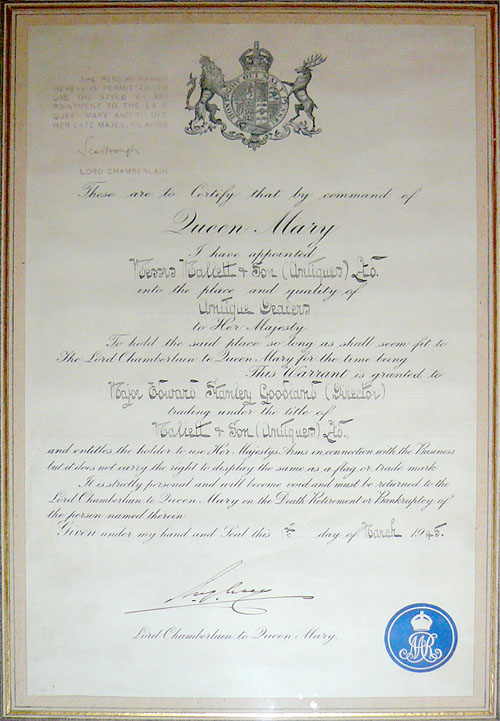 Mallett & Son Antiques, antique dealers to Queen Mary, 1945